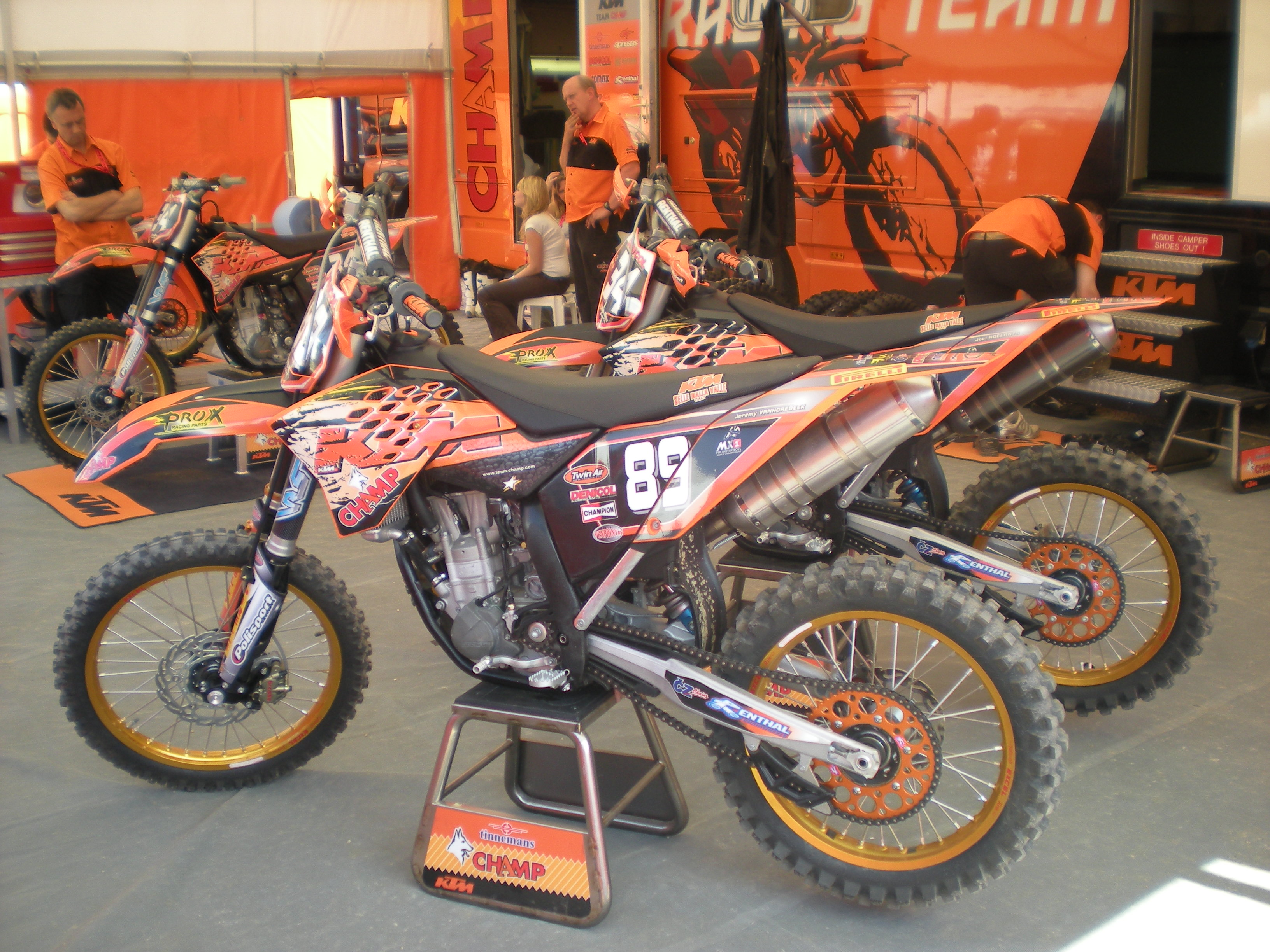 Campionato do mundo de motocross en Estoril